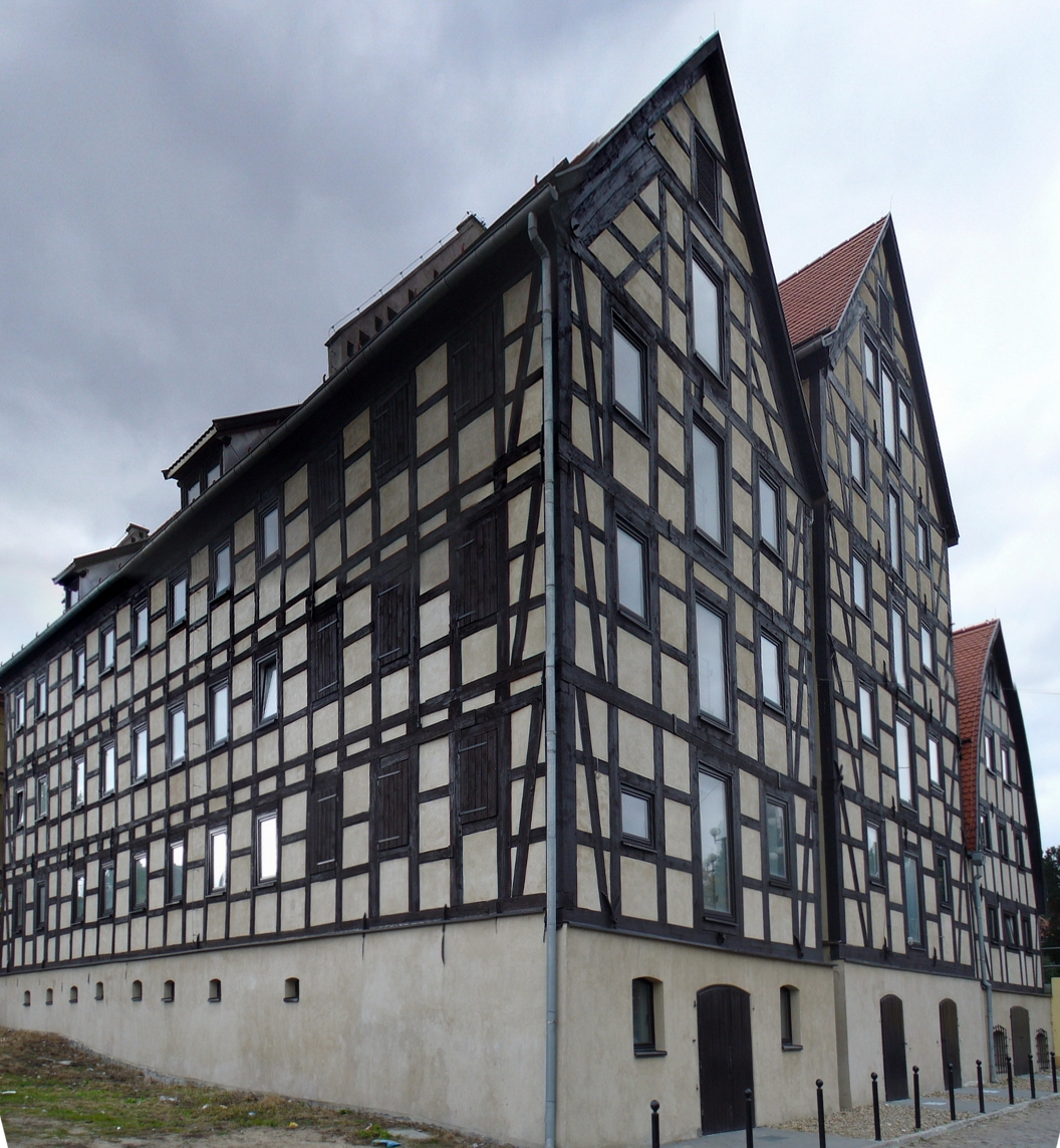 Spichrze (spichlerze) w Bydgoszczy